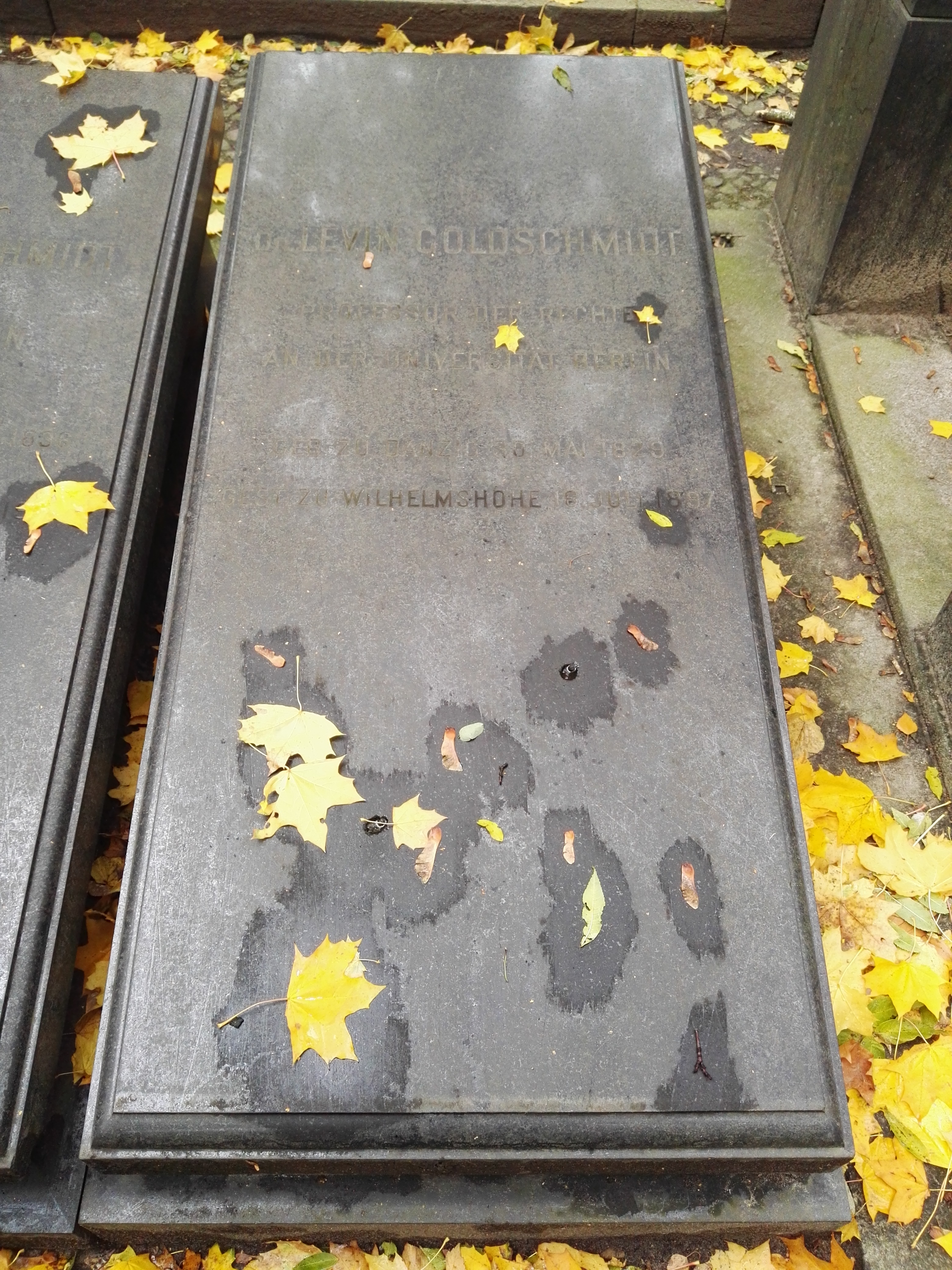 Grab von Levin Goldschmidt auf dem Jüdischen Friedhof Schöhnhauser Allee in Berlin